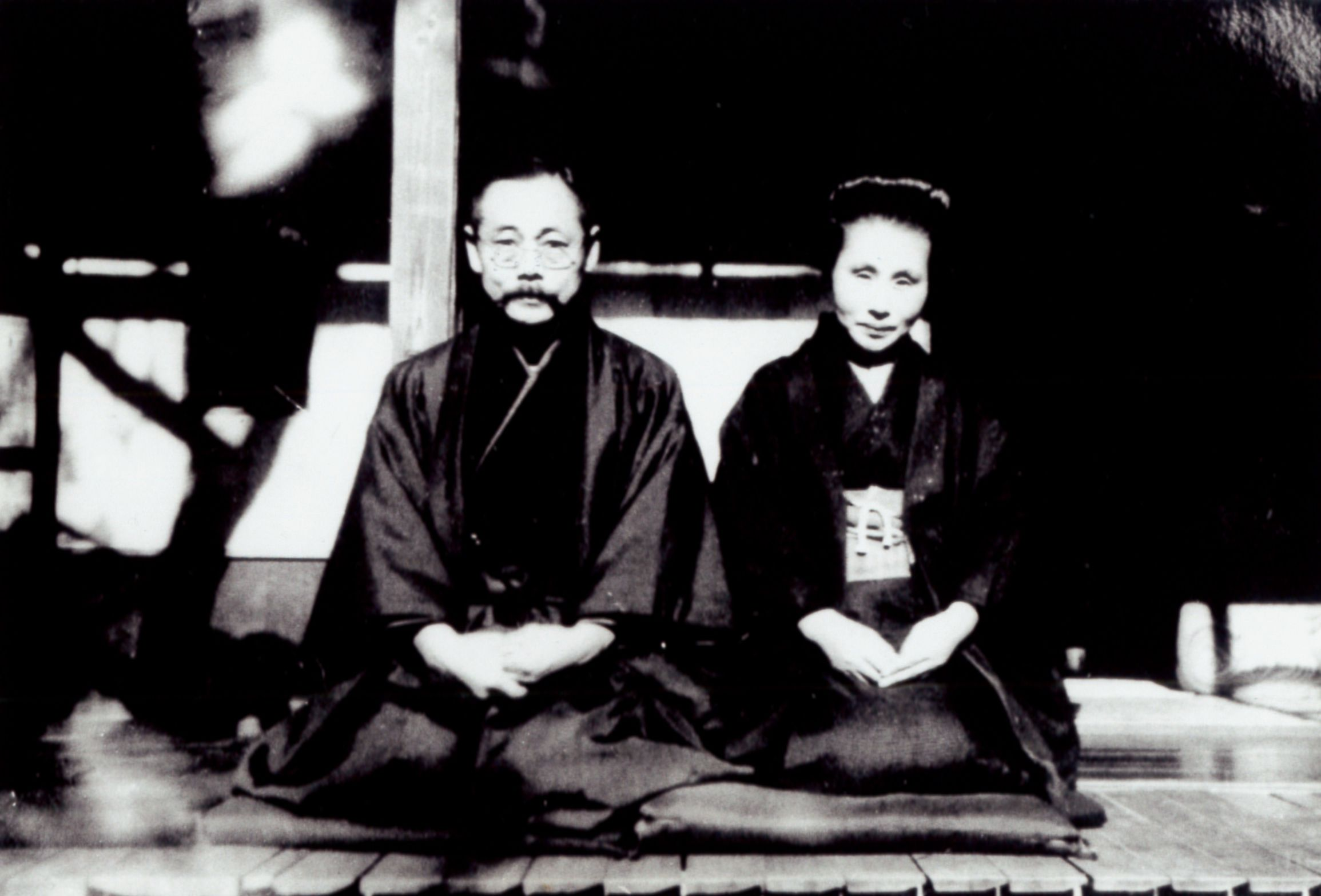 二木謙三と妻イヨ